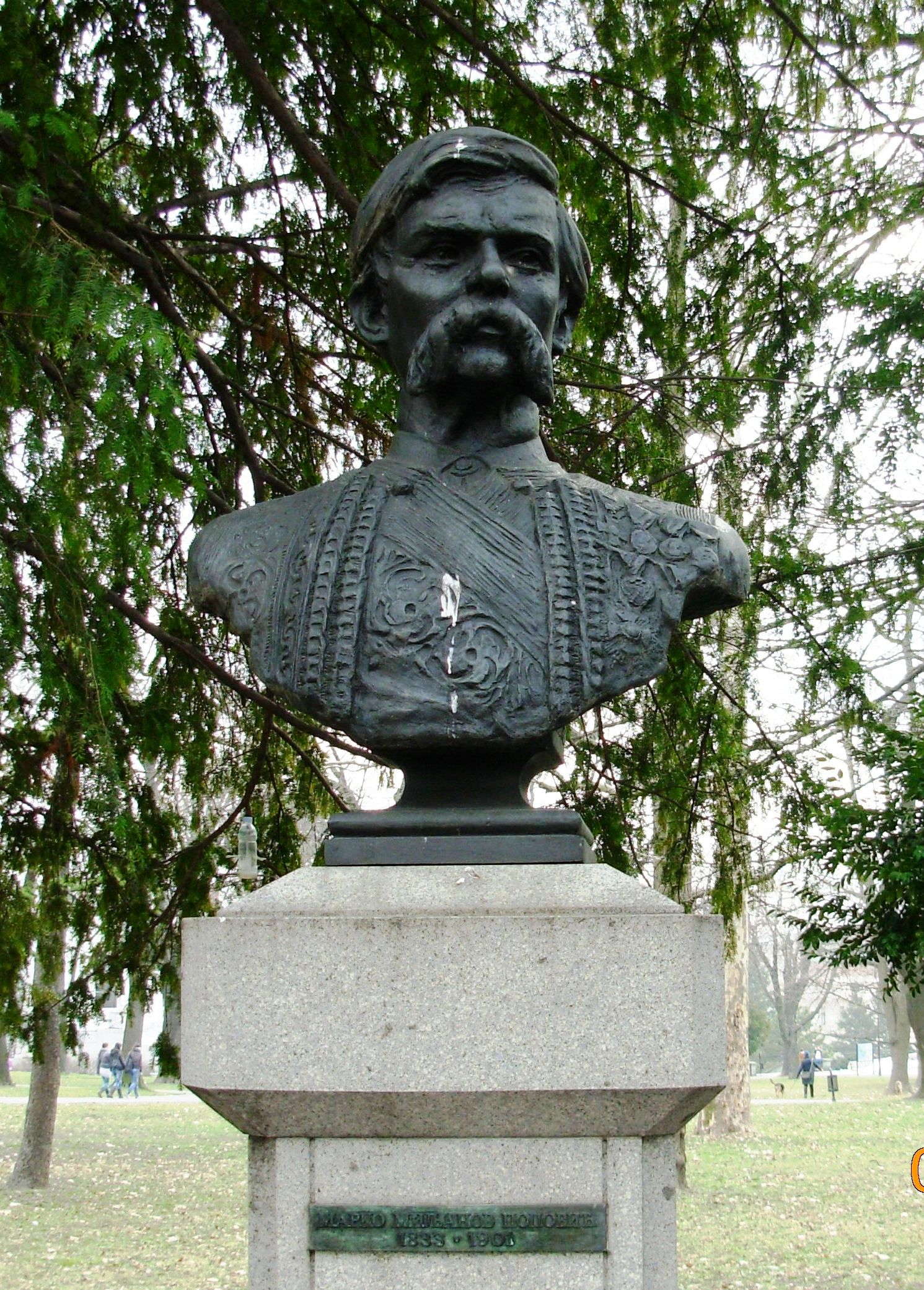 Marko Miljanov Popović, bista na Kalimegdanu, Beograd. Slikao Goldfinger